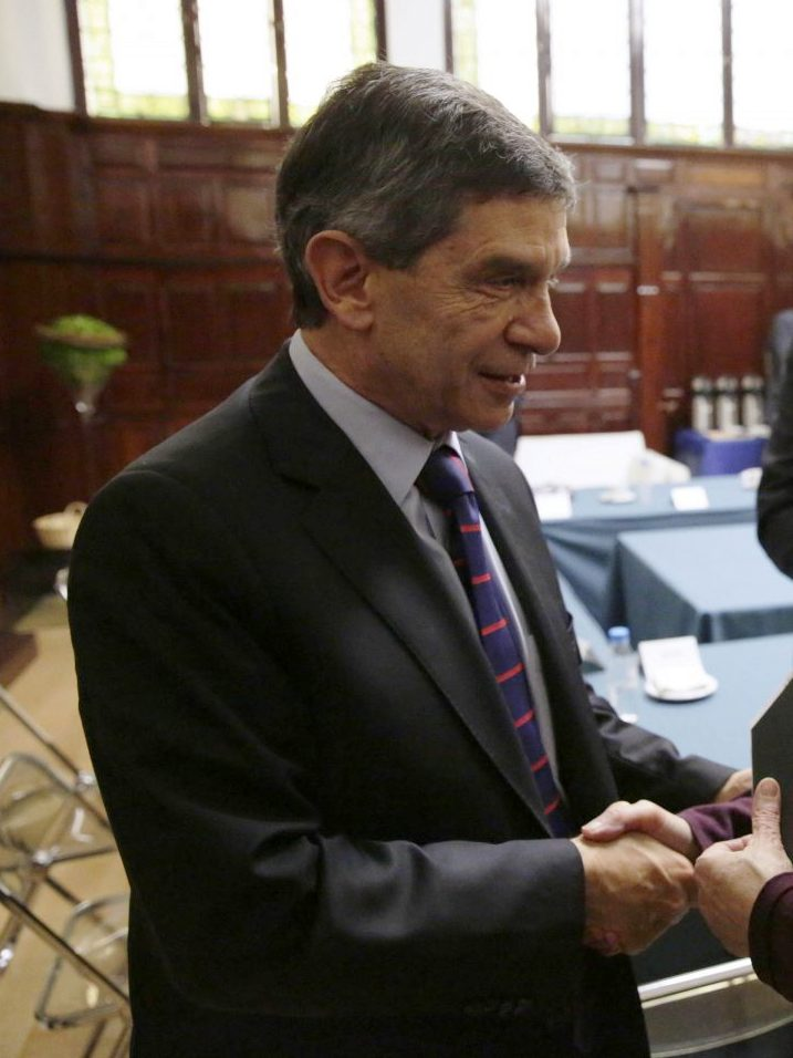 La alcaldesa de Madrid, Manuela Carmena, clausuró a mediodía de hoy una reunión del Centro Internacional de Toledo para la Paz (CITPax) con el ministro colombiano Rafael Pardo, Alto Comisionado para el Post-Conflicto en el país sudamericano. El Ayuntamiento es uno de los patronos de este organismo. En el acto, celebrado en el palacio de Cibeles, estuvieron presentes Josep Piqué, presidente del CITPax y Emilio Cassinello, director general del Centro Internacional de Toledo para la Paz, así como una amplia representación de los ministerios de Asuntos Exteriores y Defensa, y algunos de los patronos empresariales (Telefónica, BBVA, Abertis, Indra, Repsol y CaixaBanc). La alcaldesa cerró el encuentro ofreciendo no sólo su propia experiencia vital como exmiembro del Grupo de Trabajo sobre Detenciones Arbitrarias de la ONU, sino la estructura municipal en materia de cooperación internacional de cara a apoyar el proceso de justicia transicional, que es uno de los mayores retos para Colombia. A la vez, informó a los reunidos de la celebración en Madrid, el próximo abril, del Foro sobre Violencias Urbanas y Educación para la Paz.